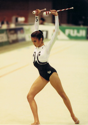 Arancha Marty